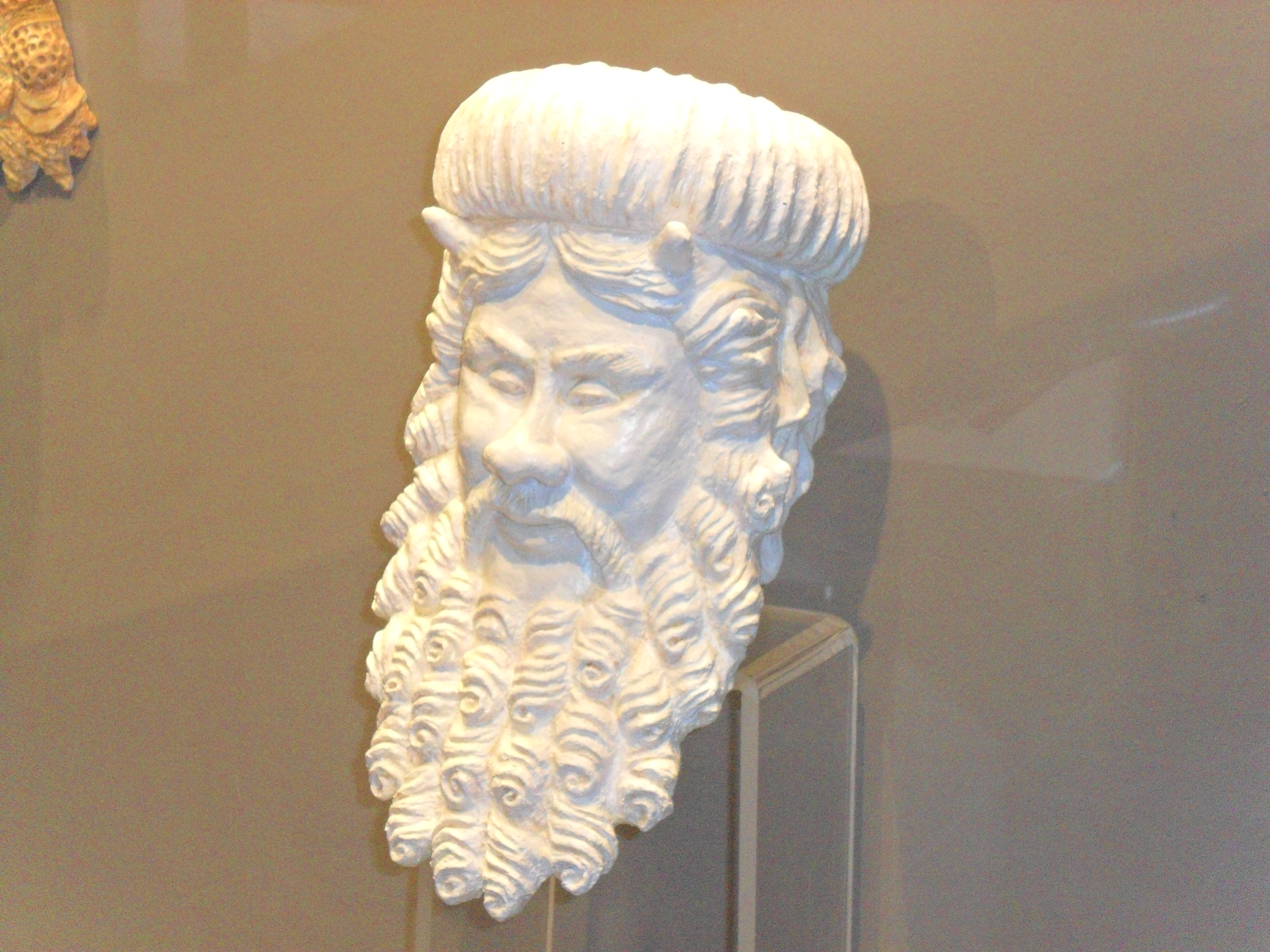 Samsun Arkeoloji ve Etnoğrafya Müzesi'nde sergilenen Dionysos/Tauros maskesinin Samsun Kent Müzesi'nde yer alan bir replikası. MÖ 125-75 yılları arasına tarihlenmektedir.